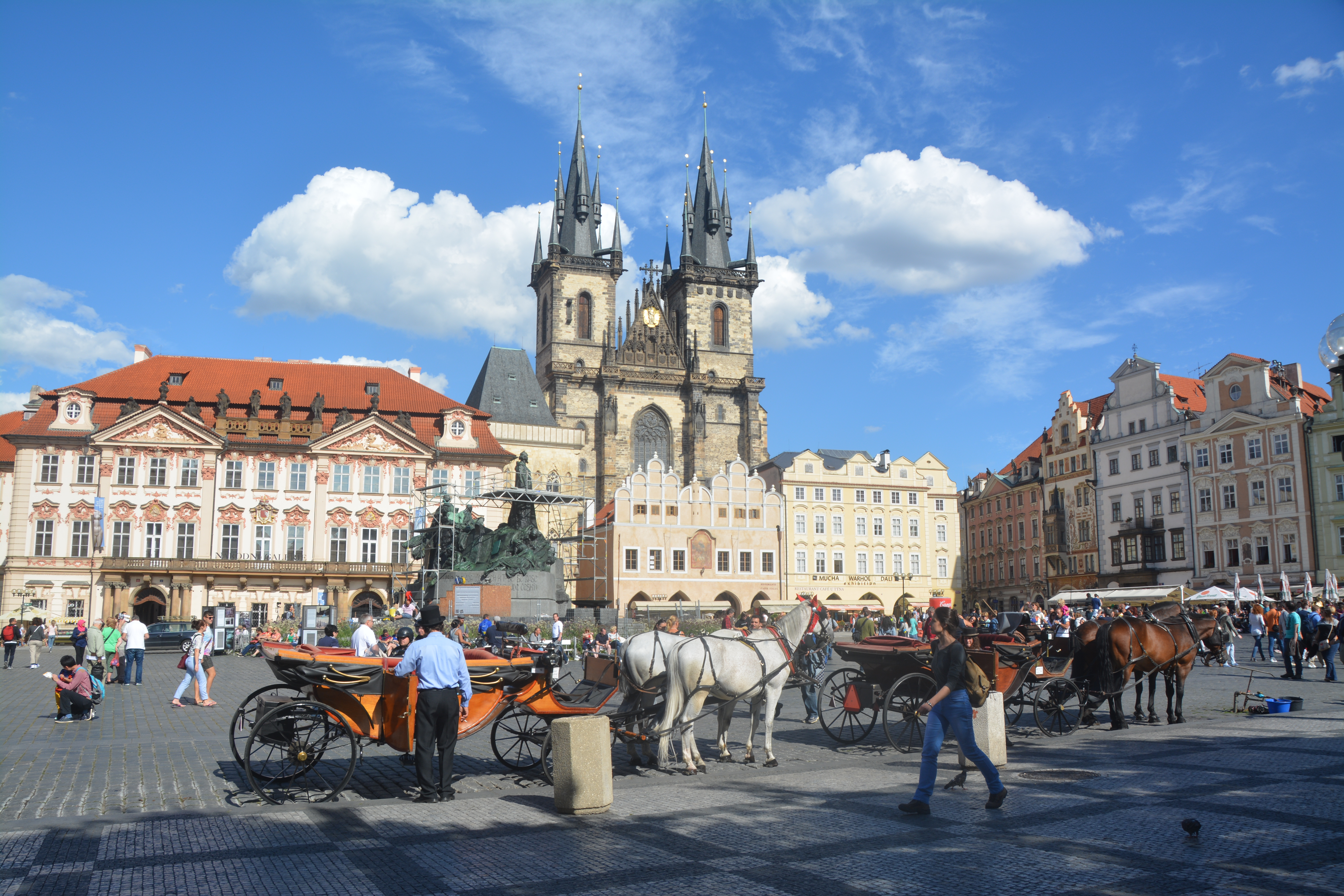 voyage en Europe